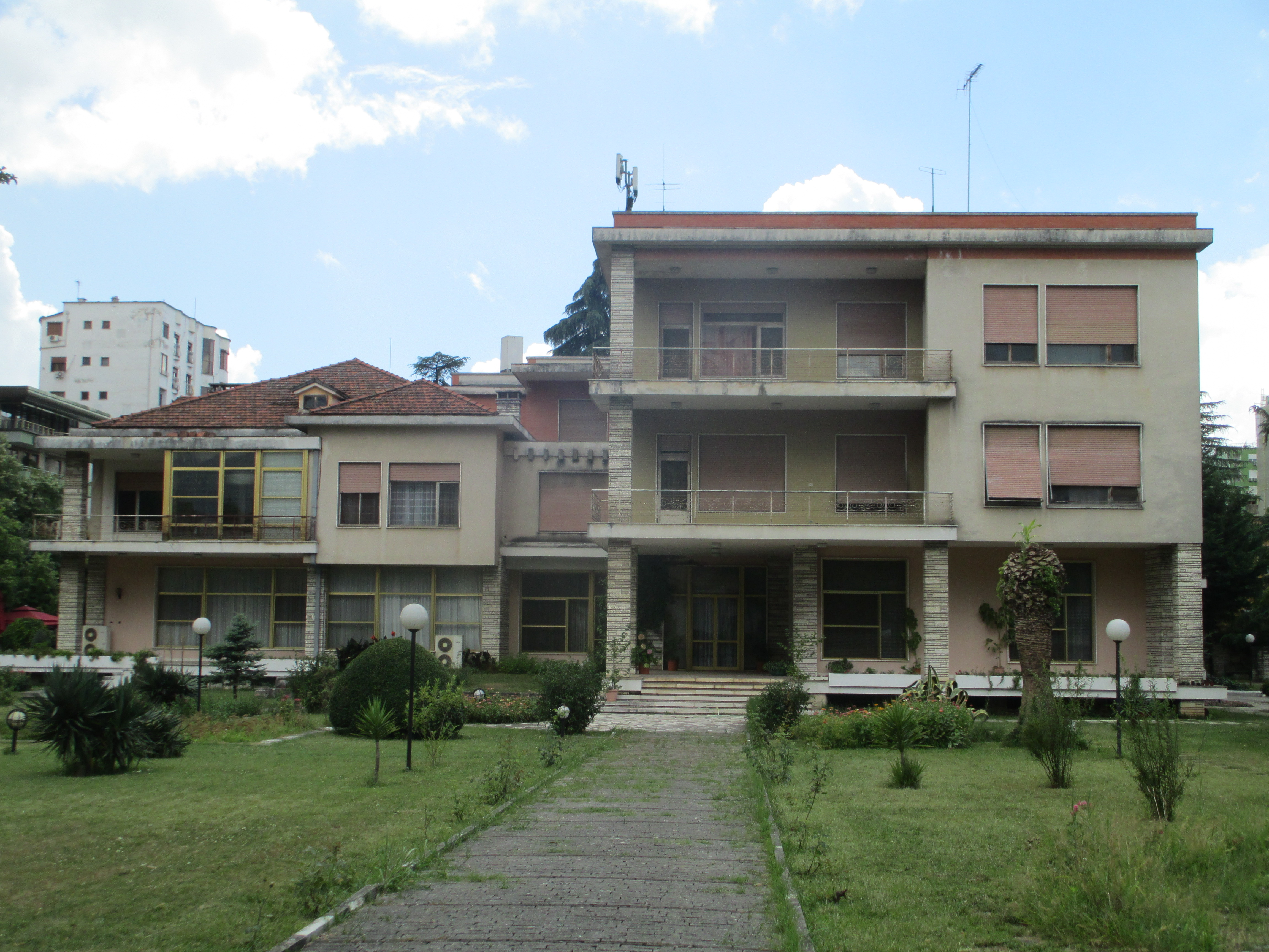 בית מגוריו של אנוור הודג'ה בטירנה